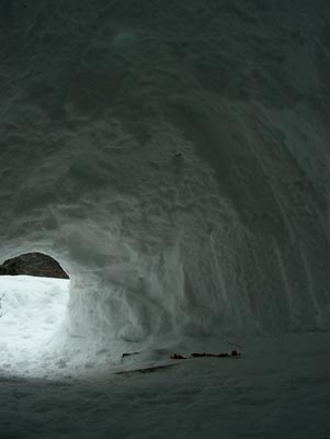 L'intérieur d'un quinzy.